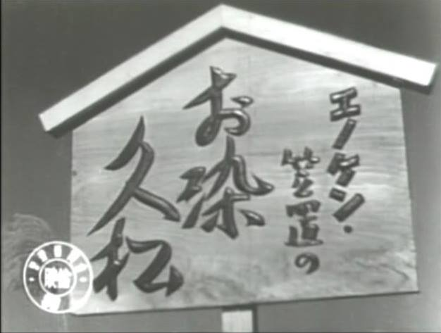 『エノケン・笠置のお染久松』、1949年、カットタイトル